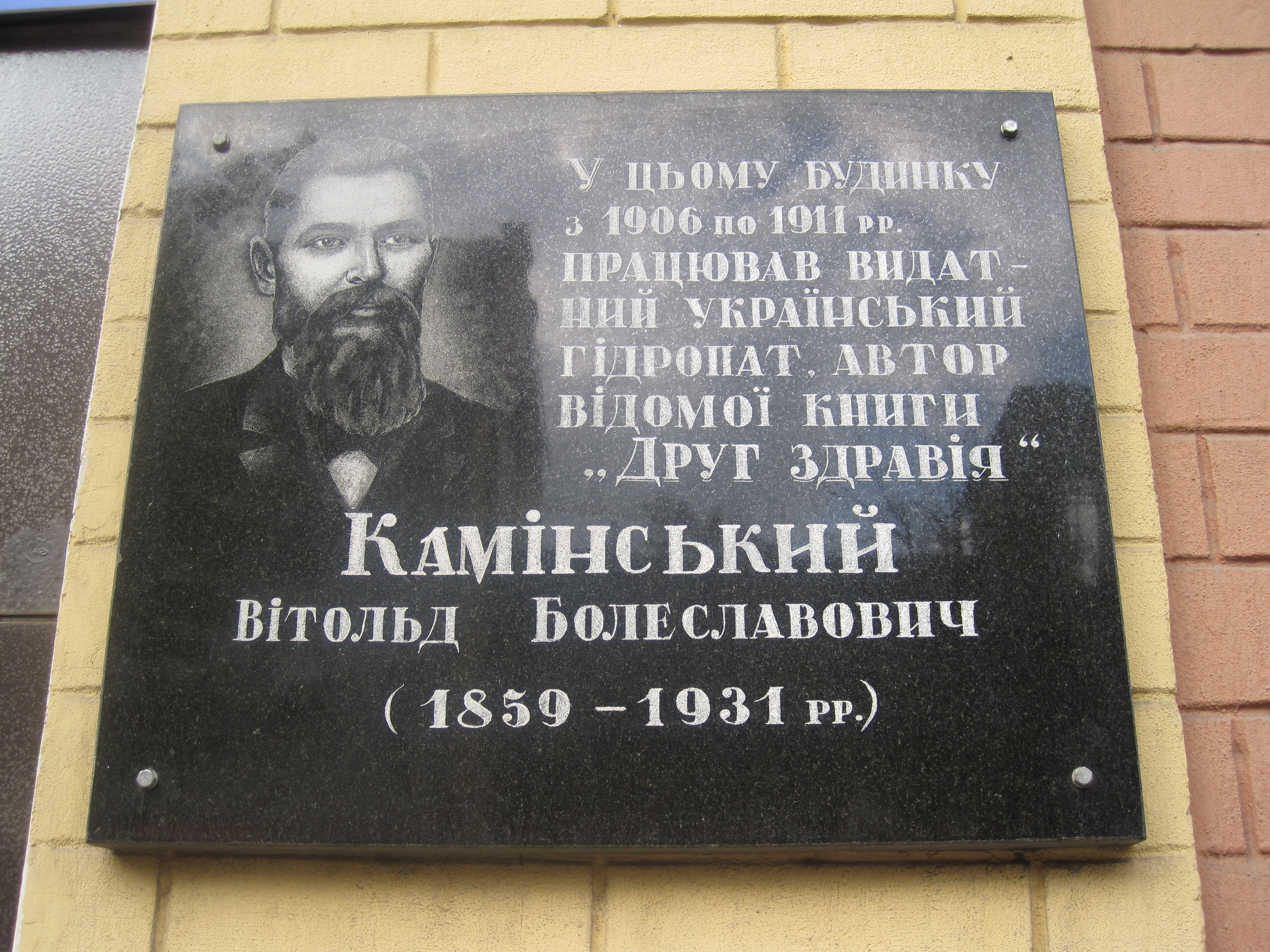 Меморіальна дошка Вітольду Болеславовичу Камінському на вулиці Саксаганського, 22 у Києві